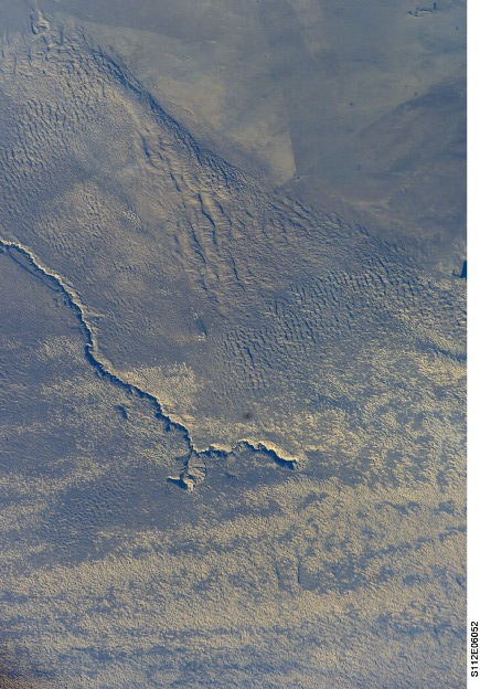 Спутниковое изображение истока Нарийн-Гола. Нарийн-Гол протекает по Монголии и России, впадает в озеро Увс-Нур.